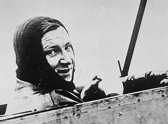 French aviator Marcel Brindejonc des Moulinais (1892-1916)